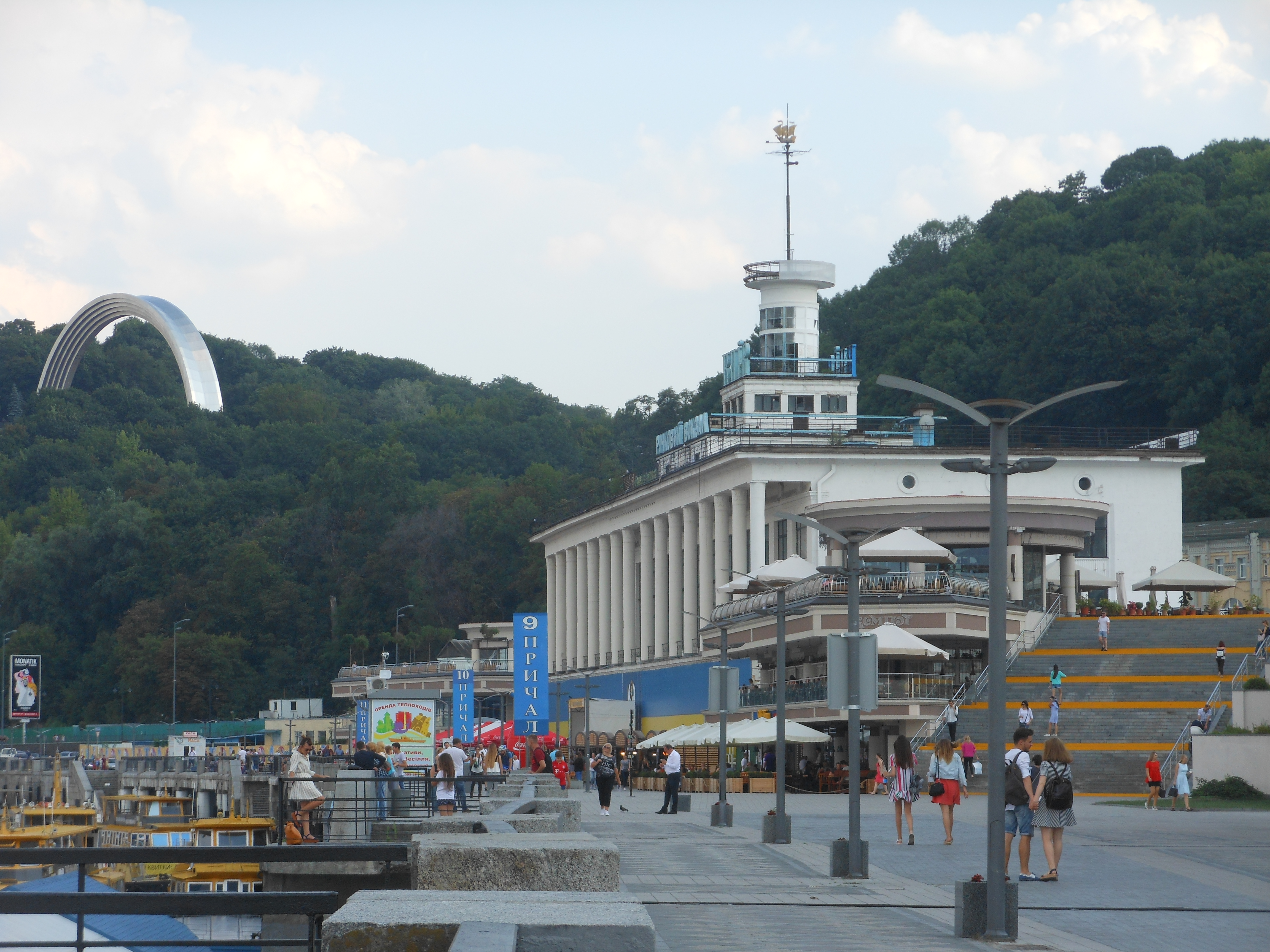 Річковий вокзал, Київ, Поштова пл.